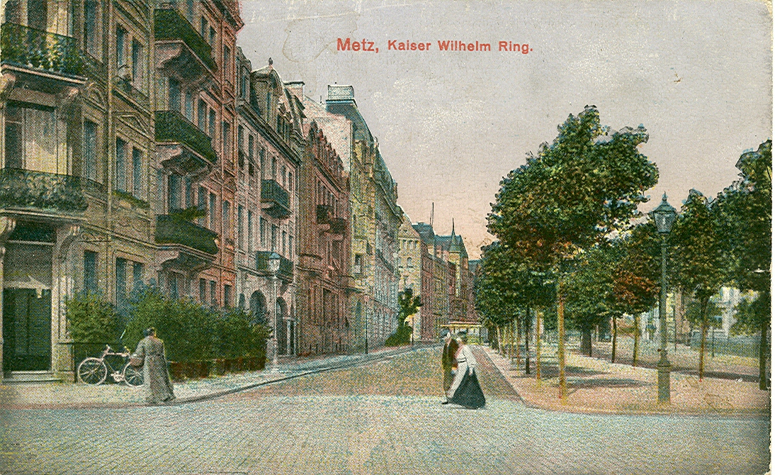 Postkarte, datiert 11.2.1917. Beschriftung: "Metz - Kaiser Wilhelm Ring"